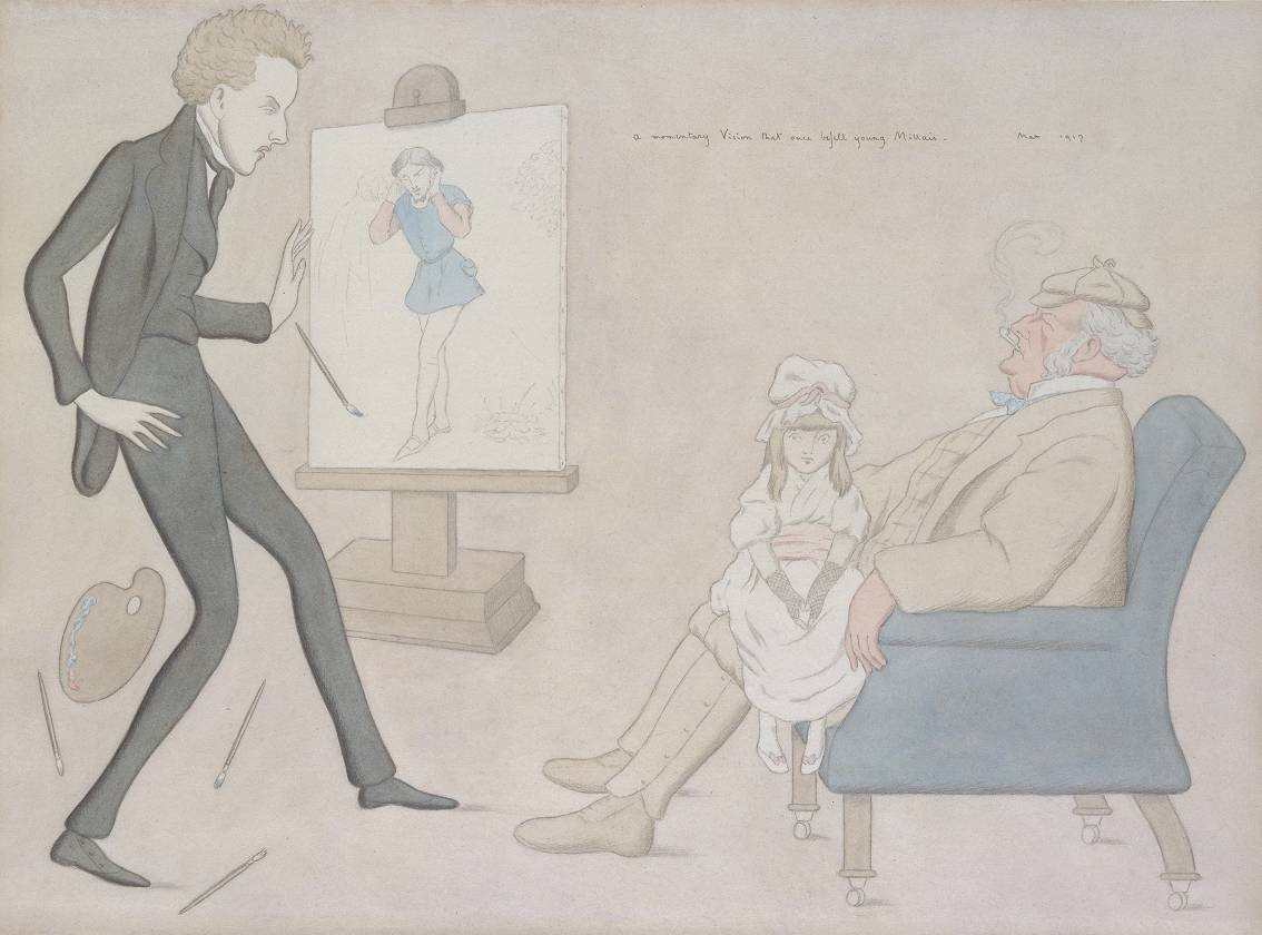 Max Beerbohm (24 August 1872 – 20 May 1956). A Momentary Vision that Once Befell Young Millais. Опубликовано впервые в Beerbohm, Max. Rossetti and His Circle. London: William Heinemann, 1922.